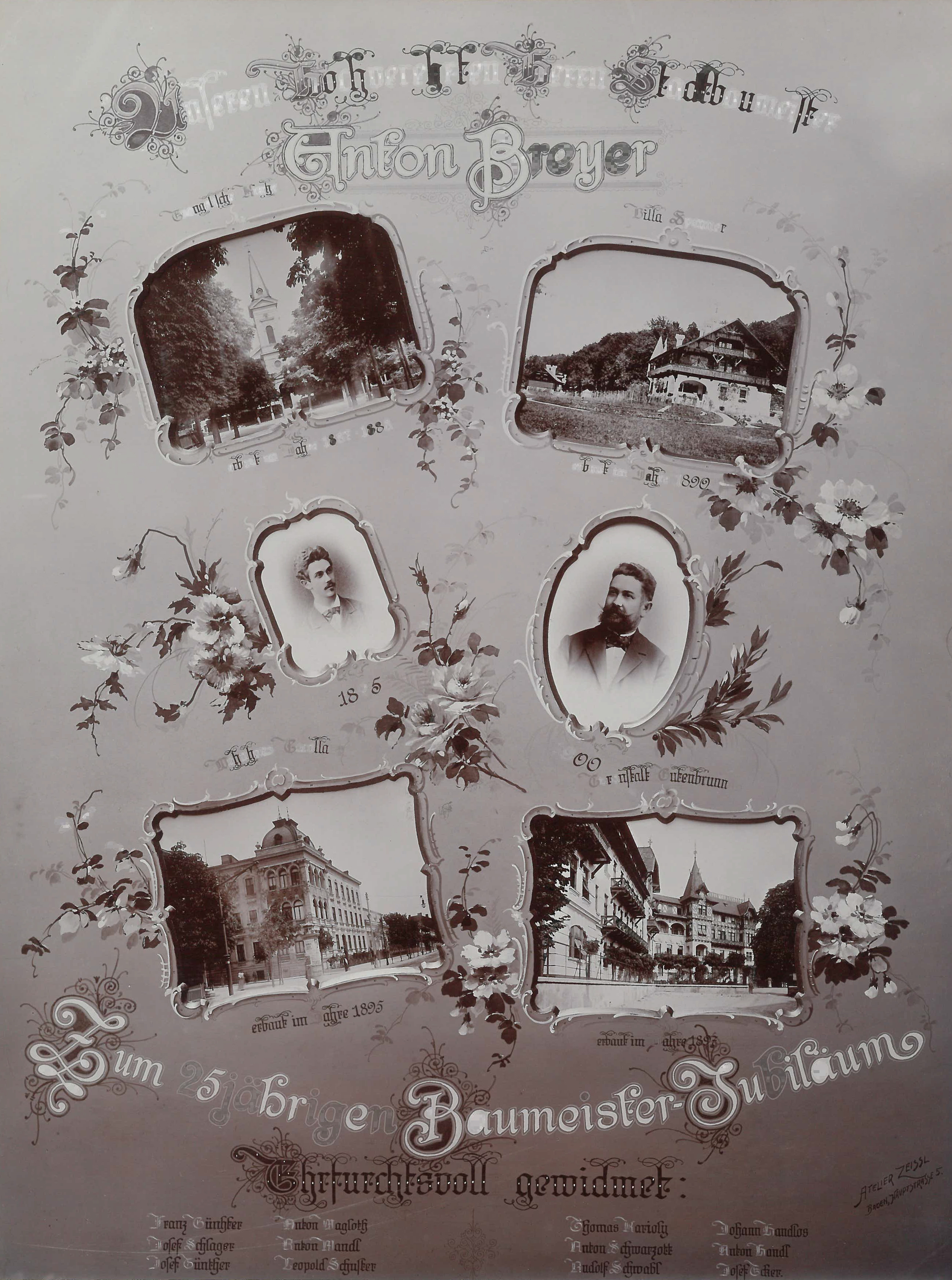 Stadtbaumeister Anton Breyer zum 25 jährigen Jubiläum - Fotocollage 1900